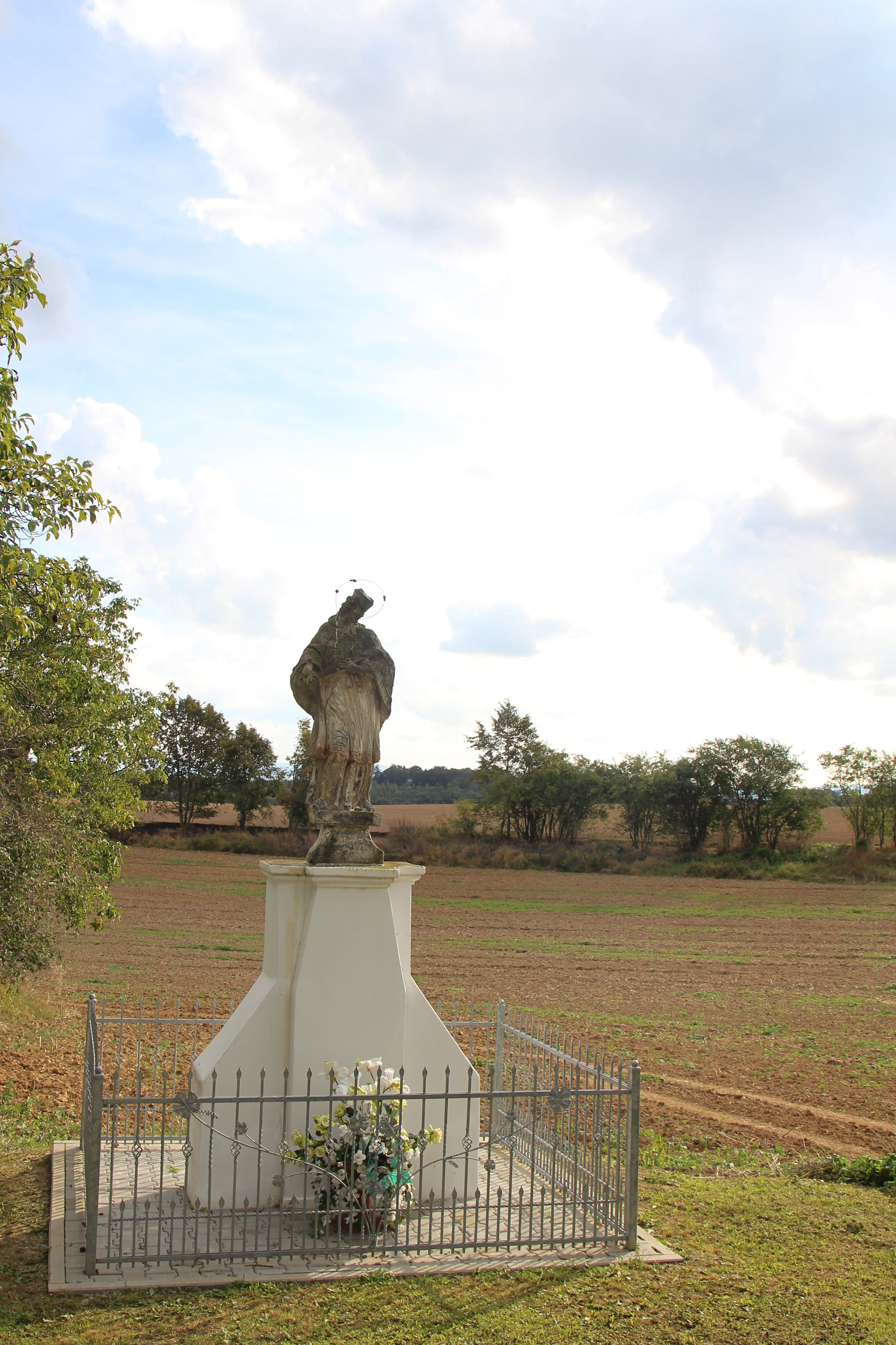 Karłowice Wielkie – wieś w Polsce położona w województwie opolskim, w powiecie nyskim, w gminie Kamiennik.